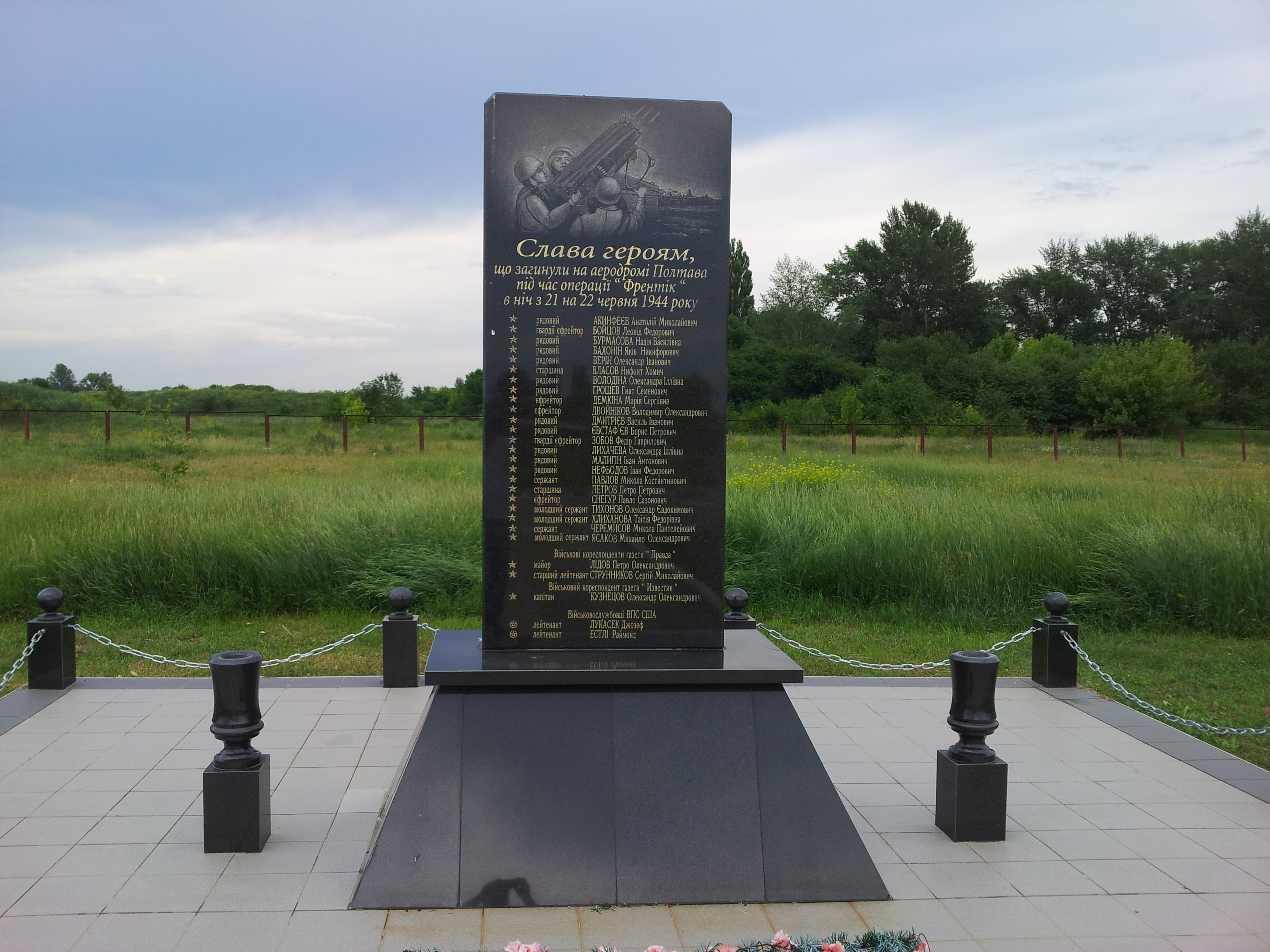 Пам’ятний знак на честь 50-річчя проведення операції “Френтік”., Полтава, Маршала Бірюзова вул.